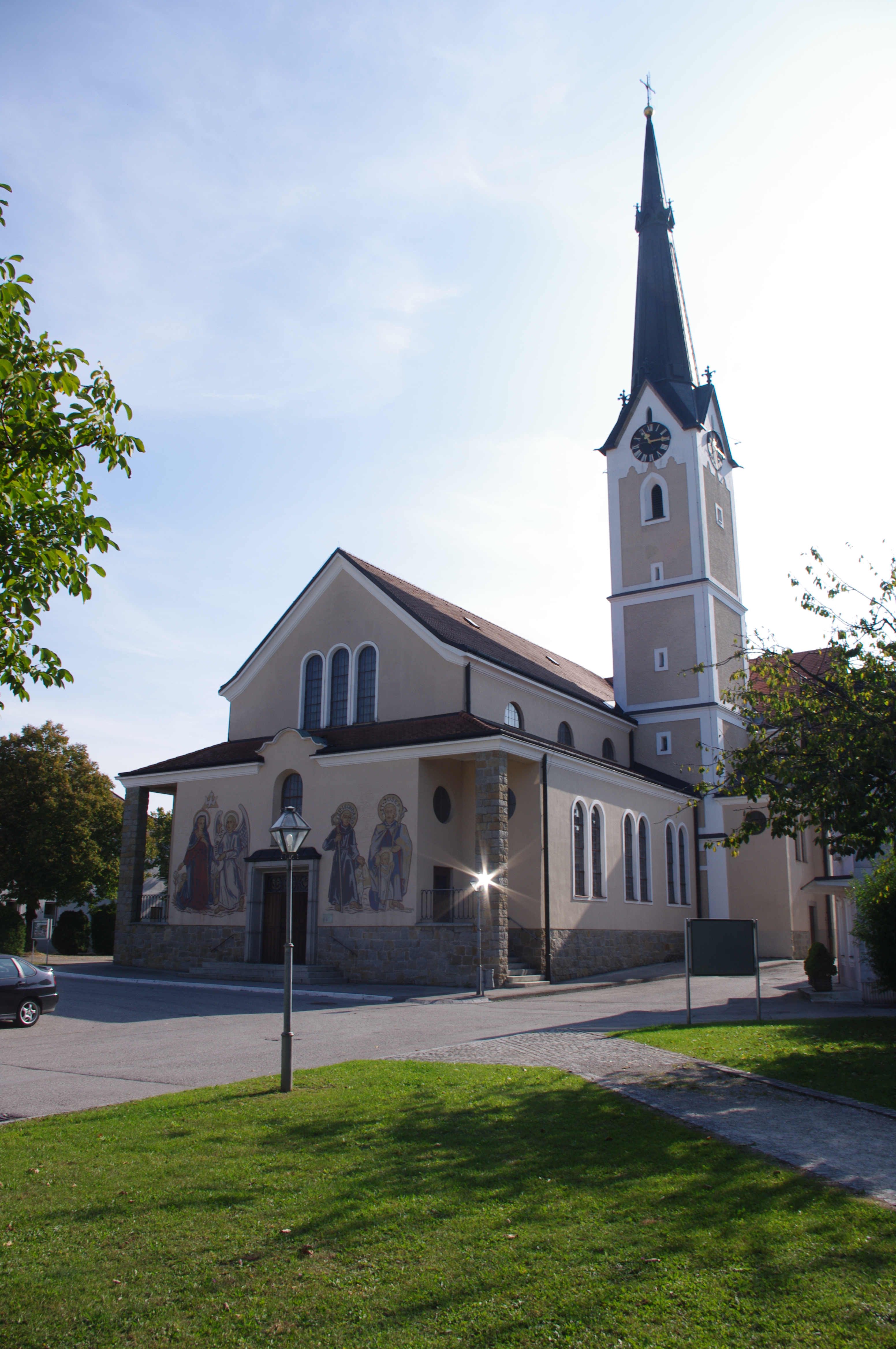 Kath. Pfarrkirche hll. Petrus und Paulus